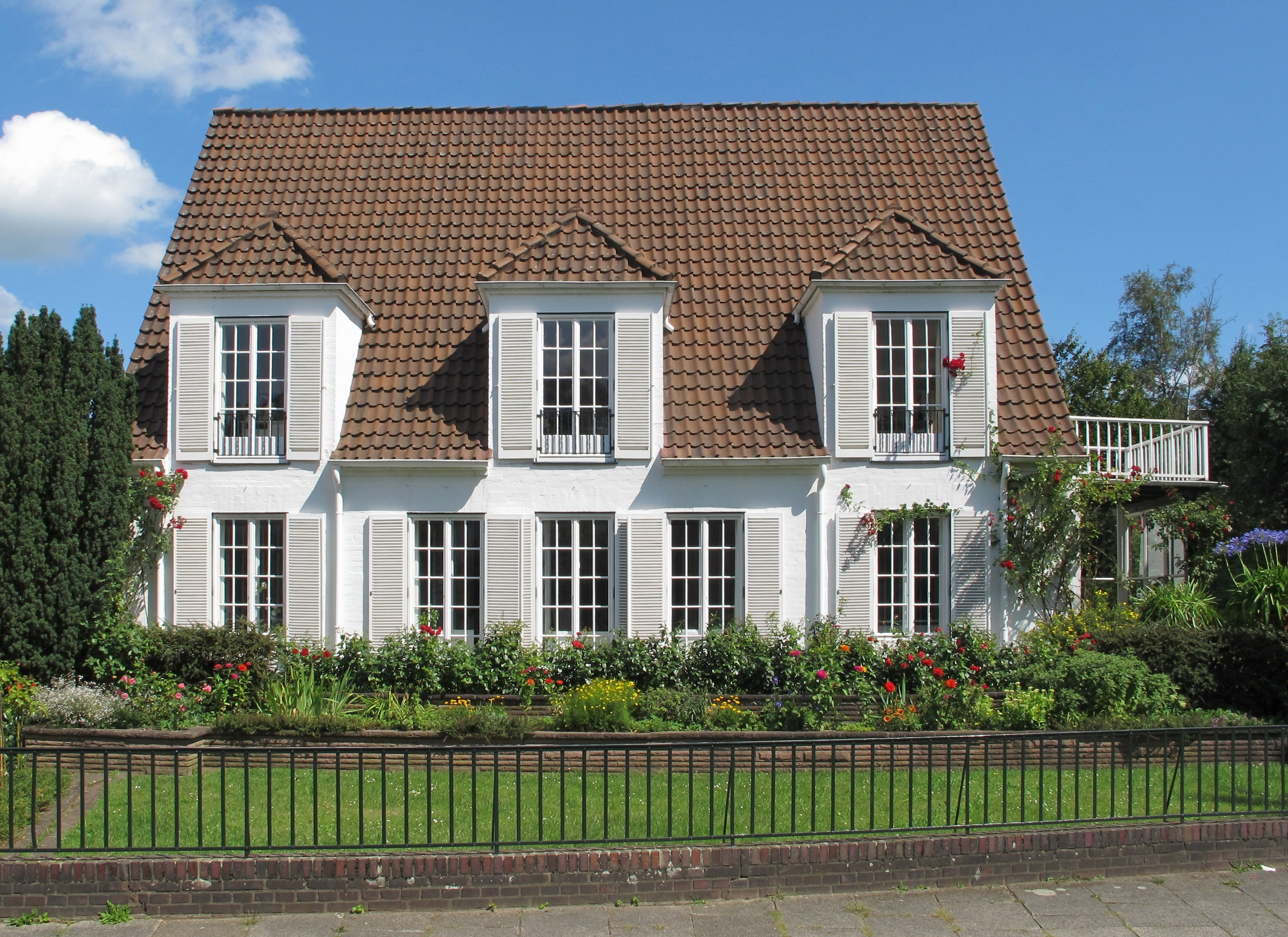 Haus Schmidt in Bremen, Arnold-Böcklin-Straße 14Das abgebildete Objekt ist ein geschütztes Kulturdenkmal in der Freien Hansestadt Bremen, mit der Nr. 0090 beim Landesamt für Denkmalpflege registriert.